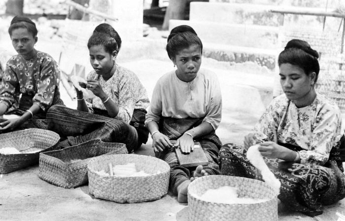 Repronegatief. Vier katoenbewerksters ontpitten en rollen de katoen